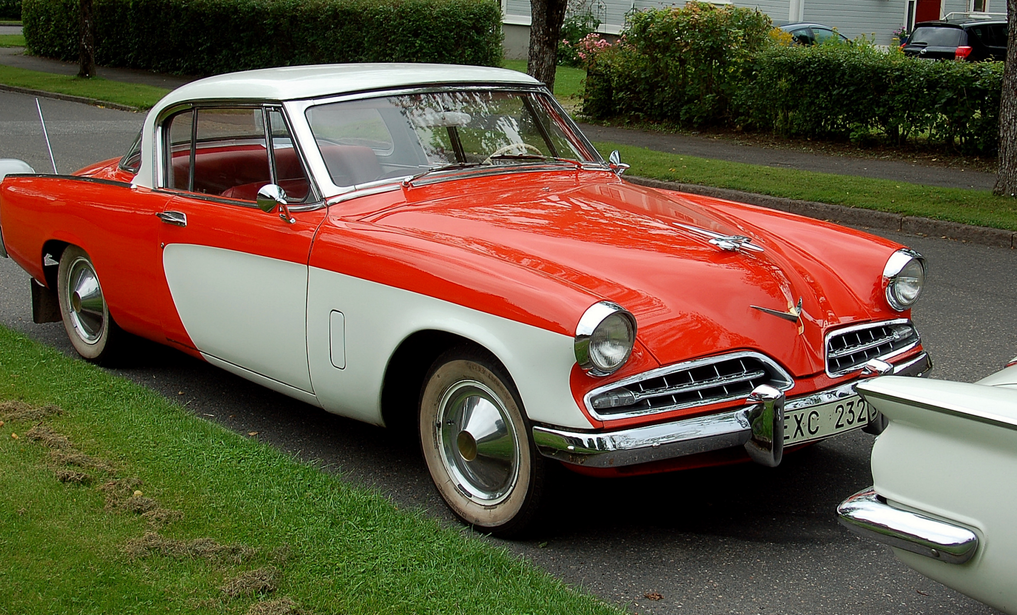 STUDEBAKER CHAMPION Regal Starliner Hardtop Färg: Flerfärgad Fordonsår: 1954 Chassinummer: G1298673 Tekniska data Växellåda: MANUELL Tjänstevikt, kg: 1440 Längd, mm: 5150 Bredd, mm: 1810 Drivmedel BENSIN Motoreffekt, kw: 63,0